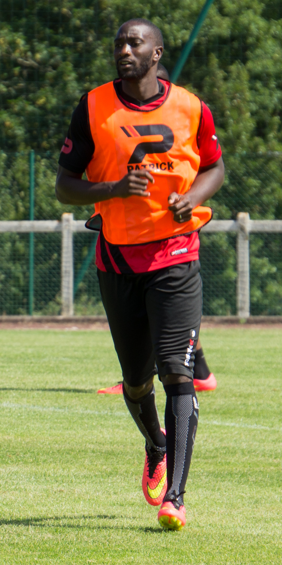 Mustapha Yatabaré à l'entrainement le 10 juillet 2014